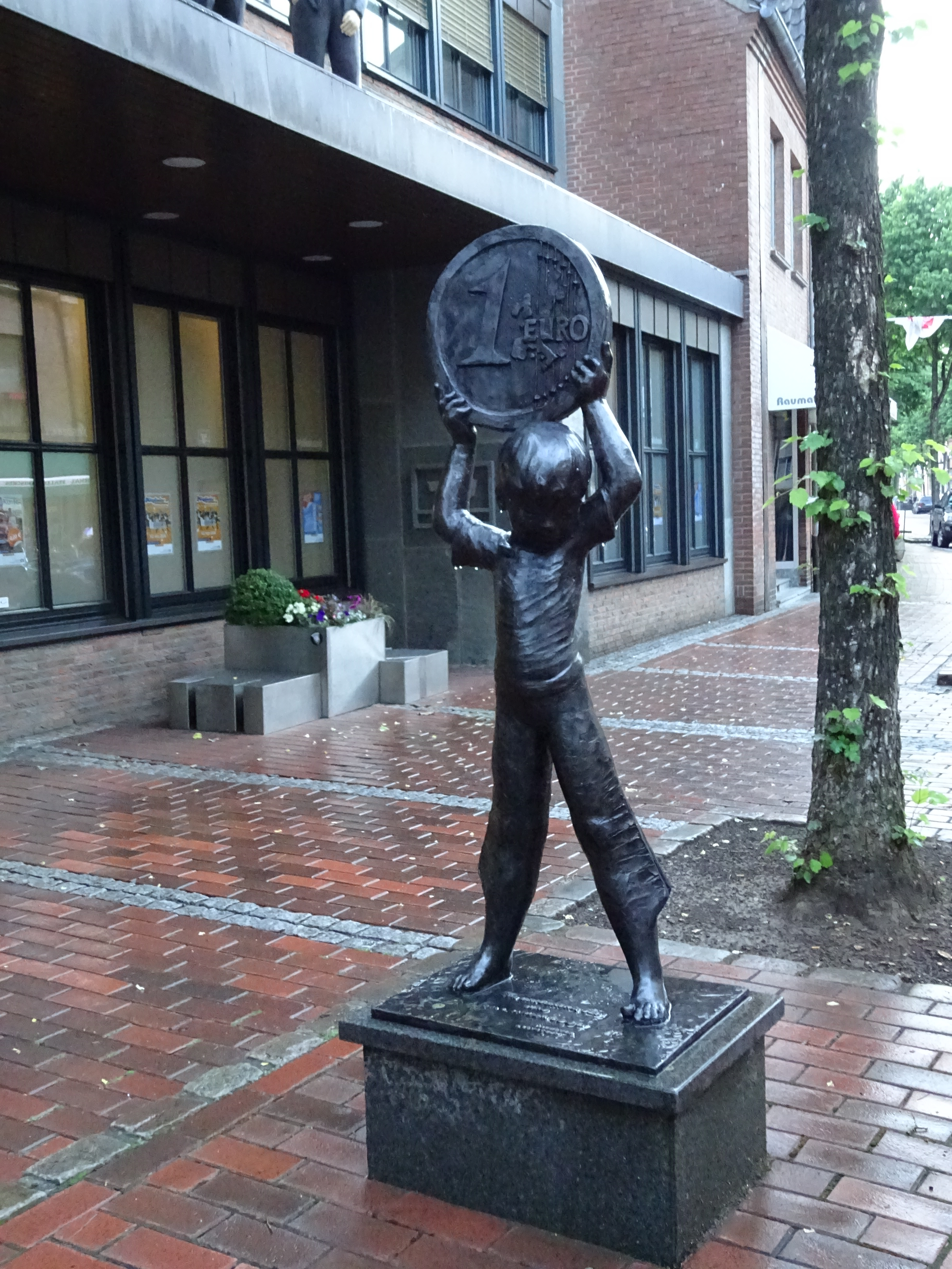 Rees, Volksbank mit Eurojunge von Dieter von Levetzow an der Dellstraße